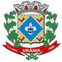 Brasão da cidade de Urânia, SP